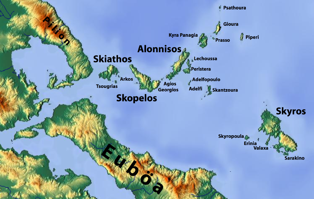 Nördliche Sporaden, Griechenland